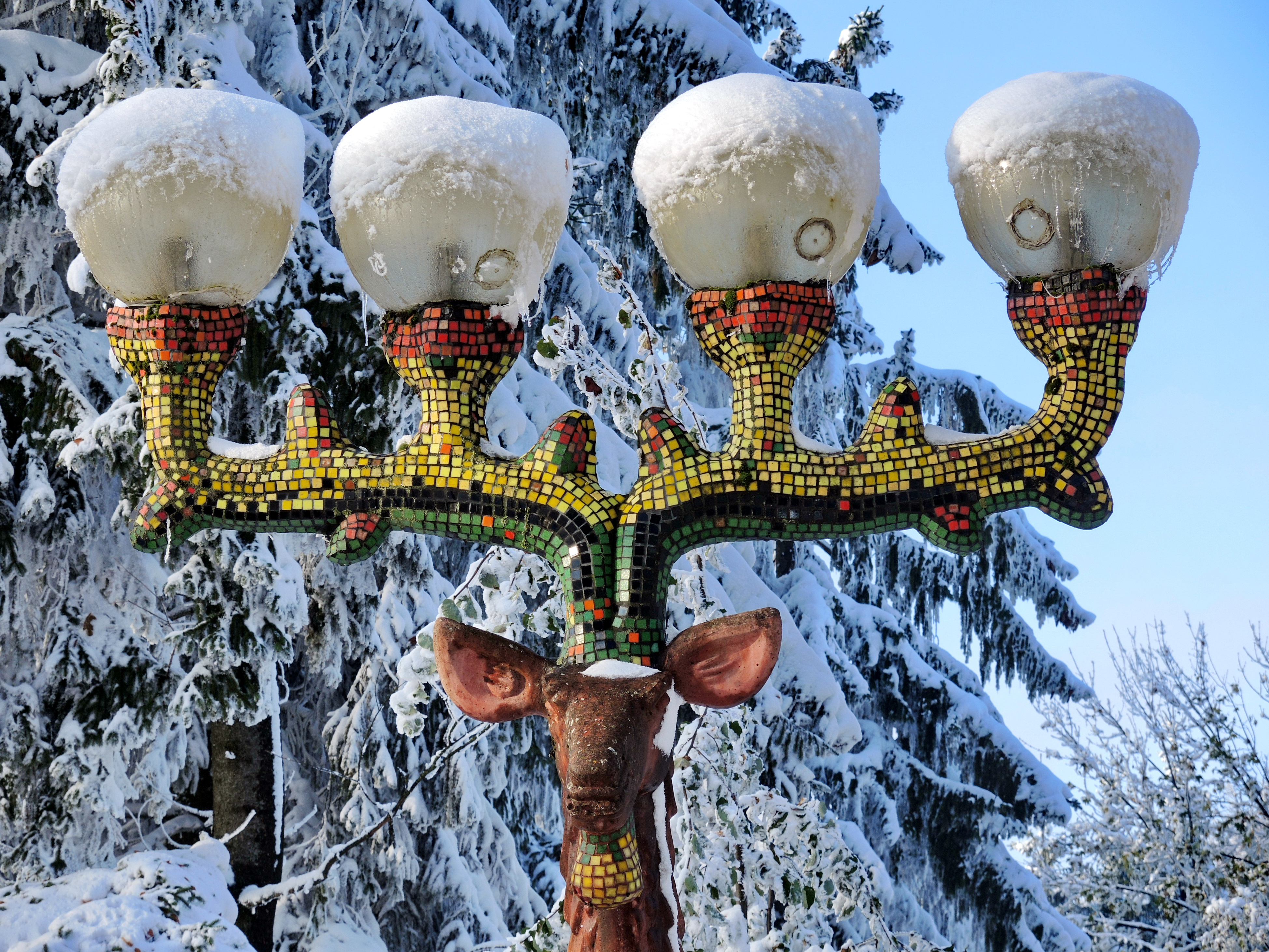 Sculpture by Bruno Weber, Uetliberg in Zürich